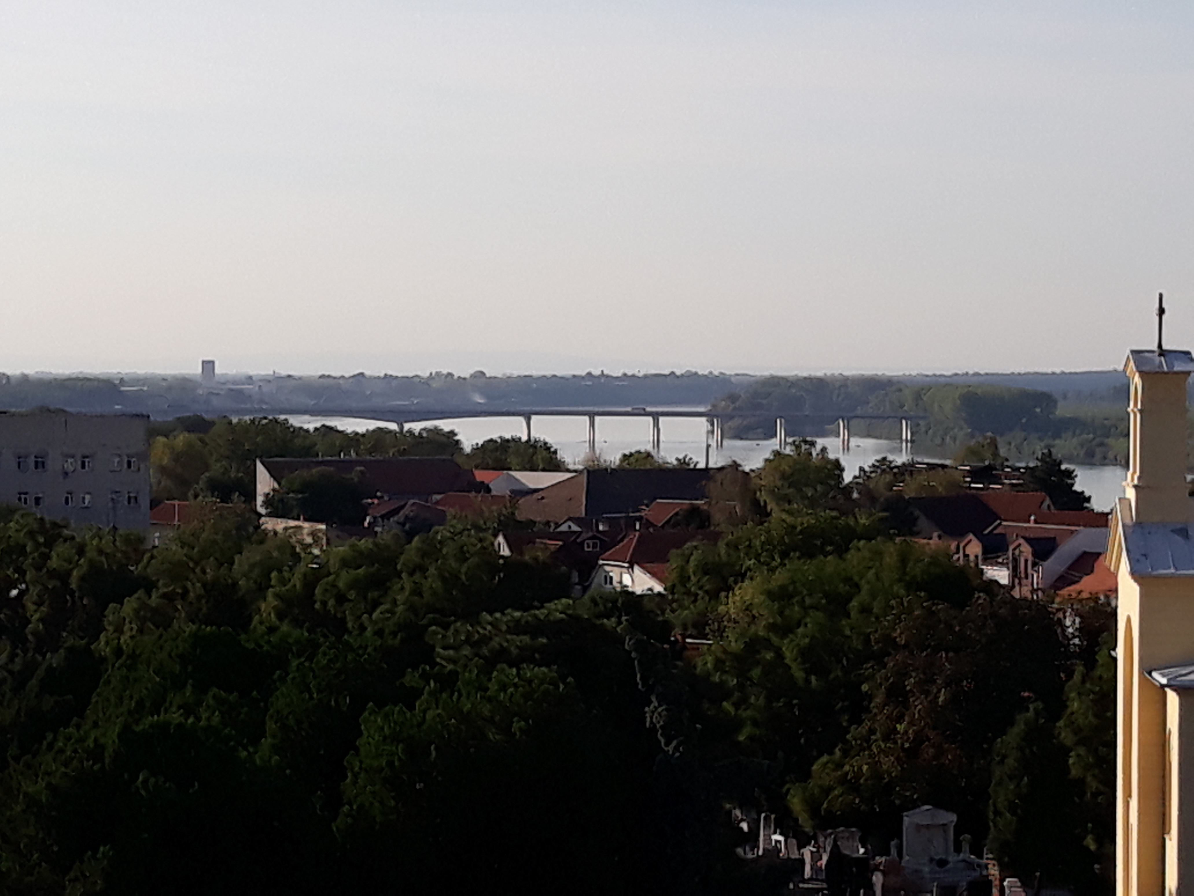 Фотографије Гардош куле и панорама њене околине.